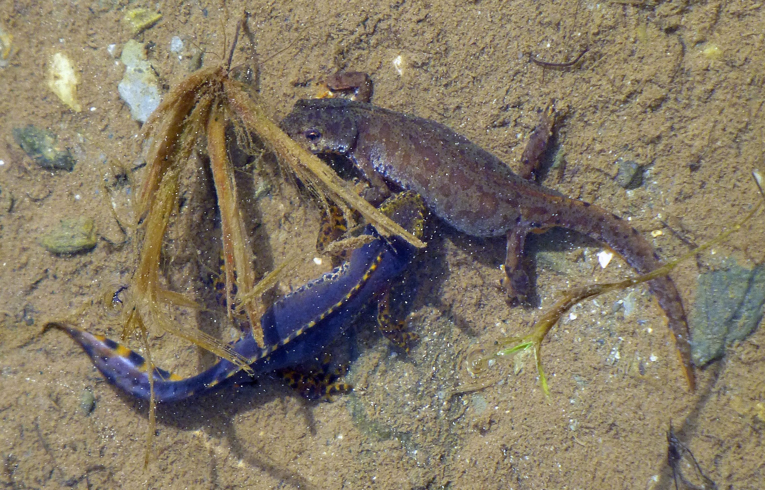 Bergmolche; ein Männchen (links) umwirbt ein Weibchen (rechts) in einem Tümpel an einem Almweg